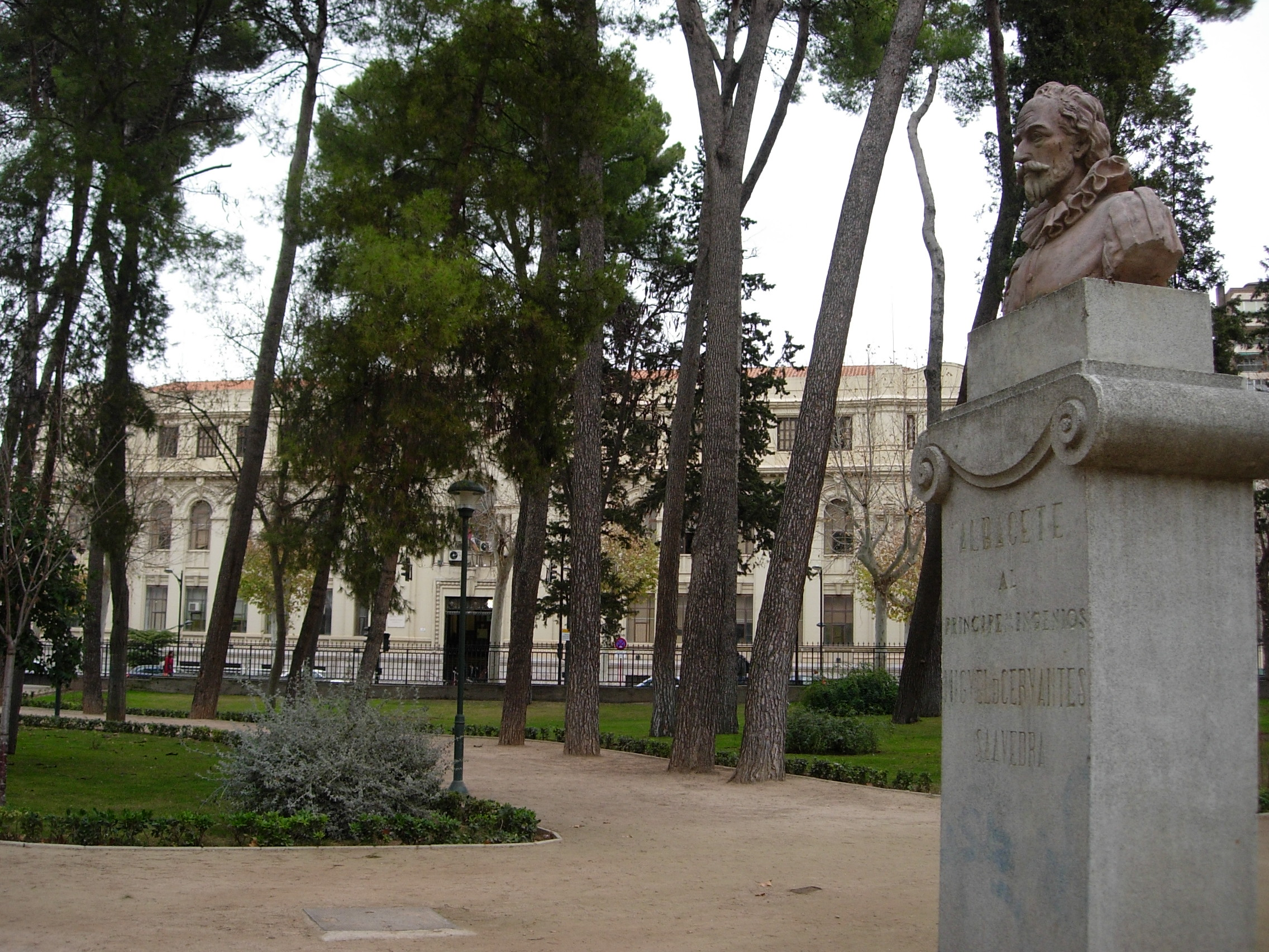 Busto dedicado a Miguel de Cervantes en el Parque de Abelardo Sánchez de Albacete (España).